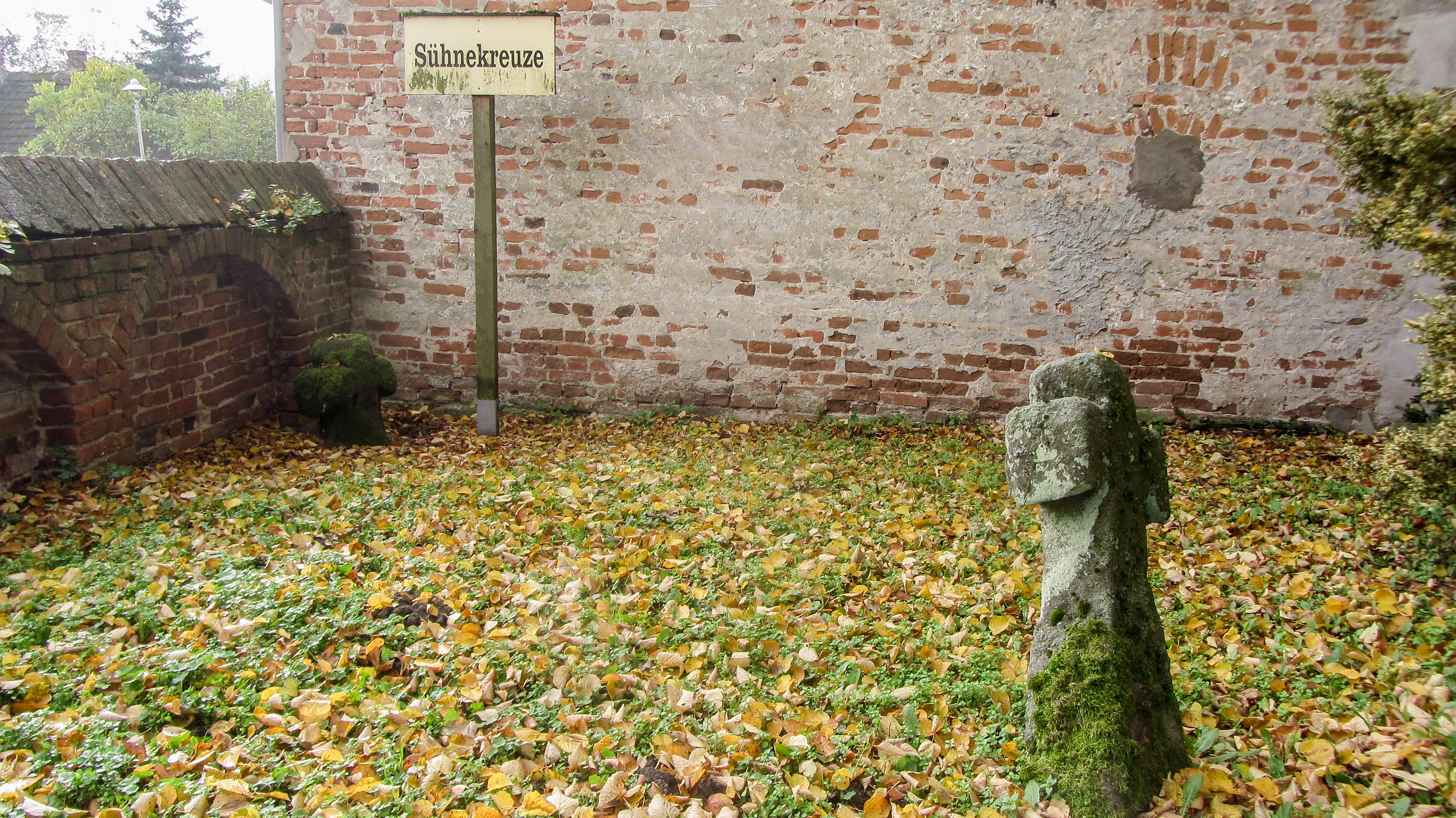 Steinkreuze auf dem Kirchhof in Berge OT von Hansestadt Werben (Elbe). Blick zum Standort Bodendenkmale in: Werben (Elbe)